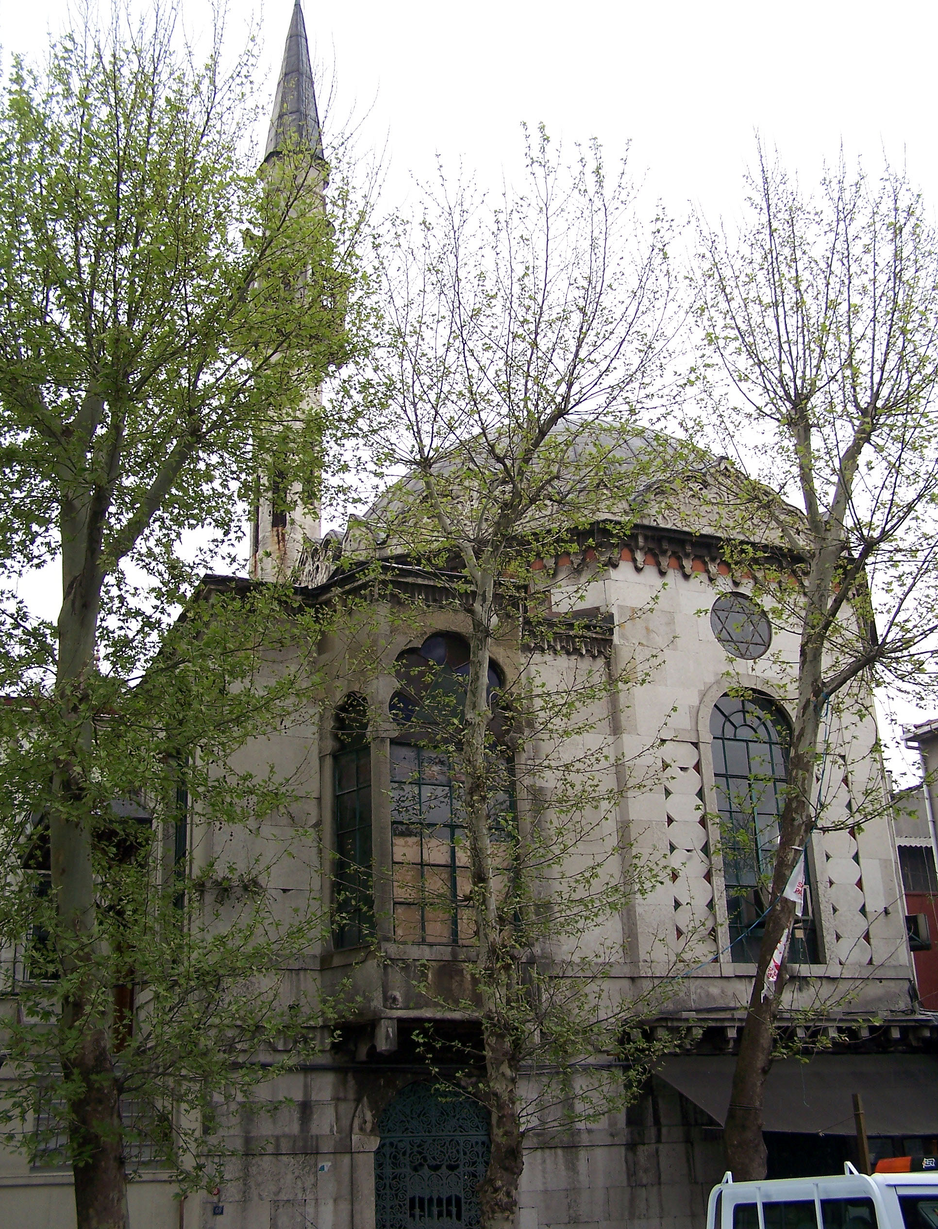 Hekimoğlu Ali Paşa Camii in Fatih, İstanbul, Turkey